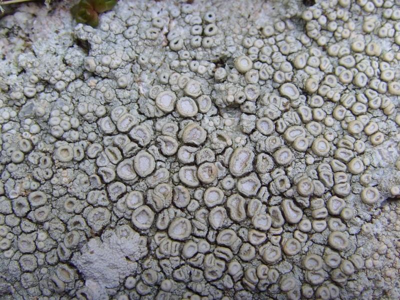 Ochrolechia parella, Cap Sizun, Finistère, France